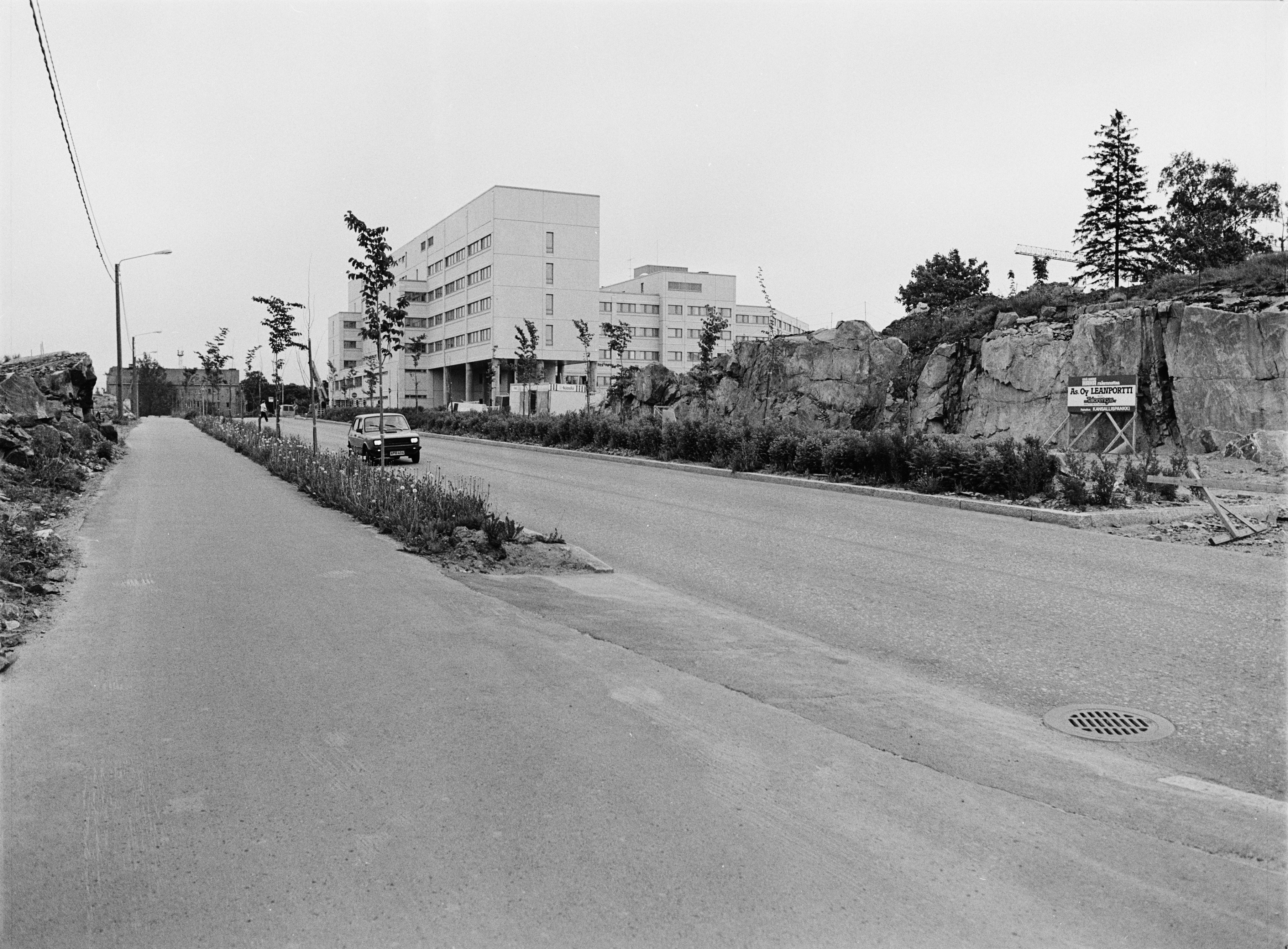 Pasila, Länsi-Pasila; Pasila, Länsi-Pasila. Pasilanraitio 13, Pasilan poliisitalo. Kuvattu Radiokadun puolelta. -- negatiivi ja vedos, filmi paperi, mv